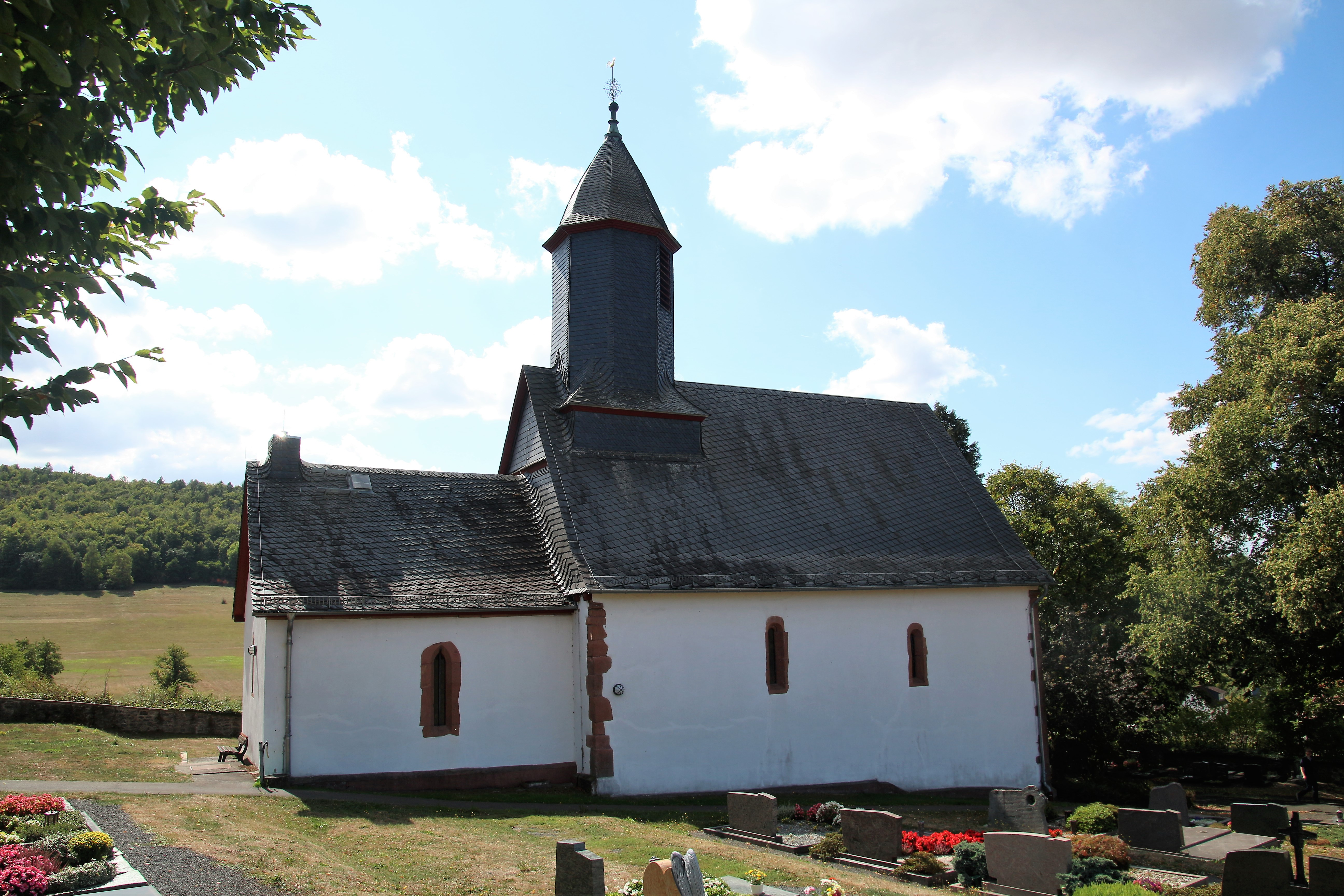 Evangelische Kirche Eichelsdorf, Gemeinde Nidda, Wetteraukreis, Hessen